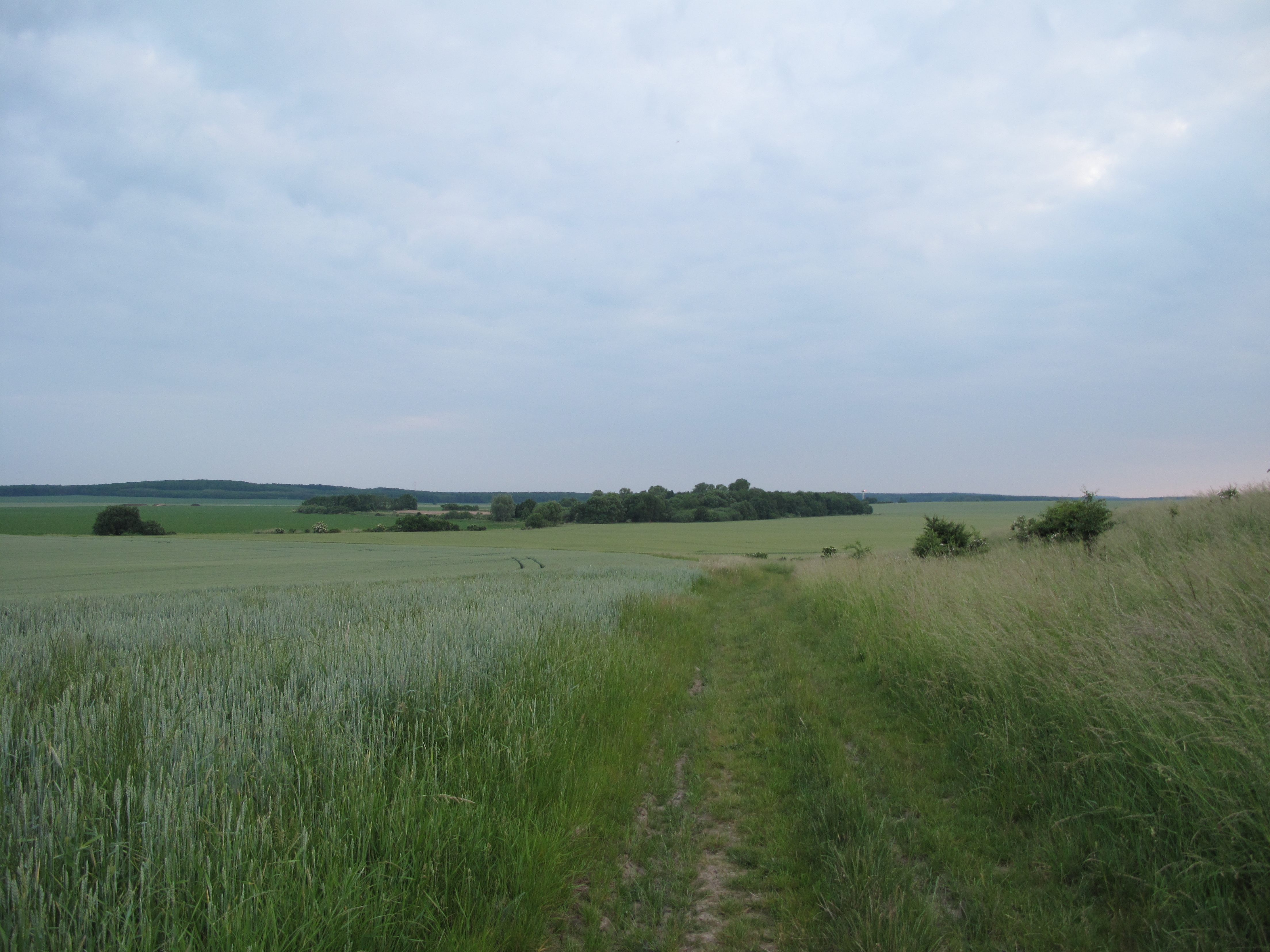 Přírodní památka Rybník Kojetín. Okres Jičín, Česká republika.